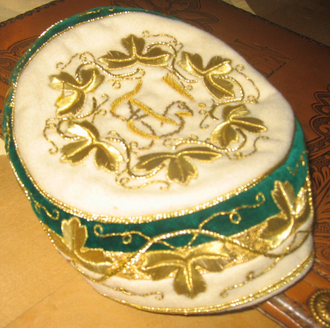 Studentisches Couleur: Prunktönnchen des Corps Arminía München